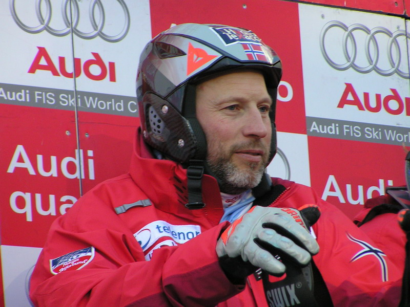 Licence: CC-BY-NC Auteur: clash Description: Lasse Kjus peu avant la cérémonie du podium au supercombiné de Wengen, 13 janvier 2006. Photo personnelle.